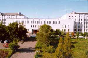 Площадка №1 СФУ